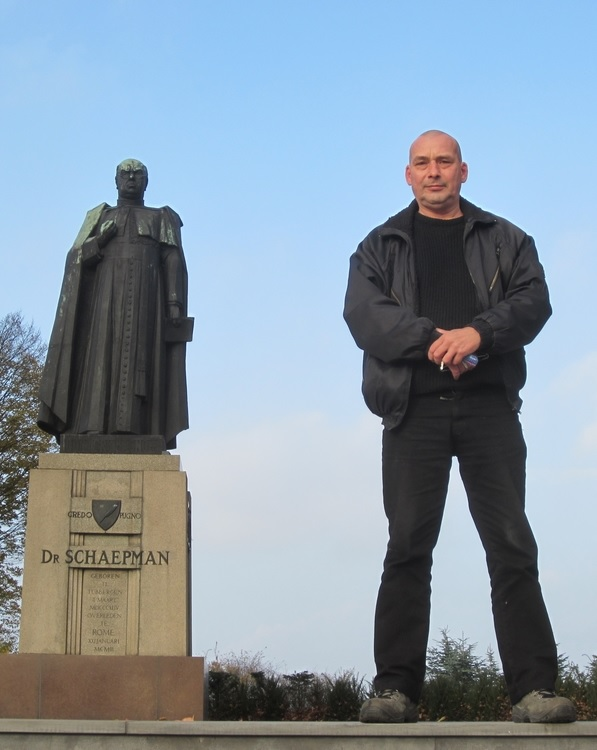 Bart FM Droog bij het standbeeld van Herman Schaepman te Tubbergen, november 2012